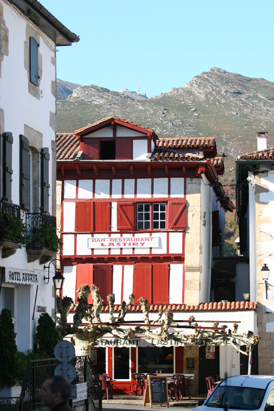 Village de sare